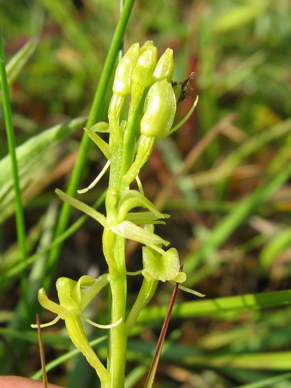 Sumpf-Glanzkraut Liparis loeselii, Müritz-Gebiet, FFH-Art